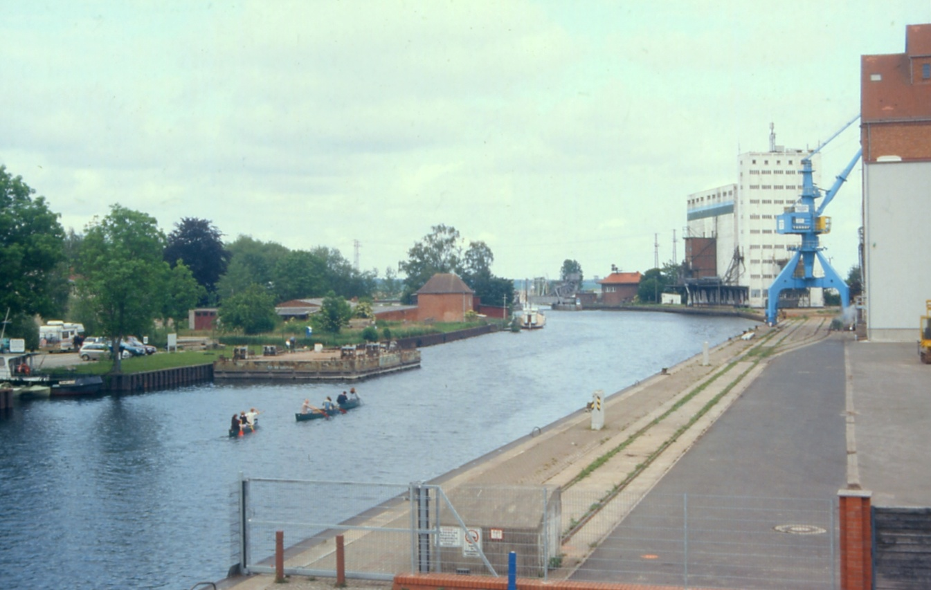 Peene mit Hafen in Anklam, gesehen von der autofreien Hafenbrücke / River Peene with port in Anklam (Western Pomorania/D)